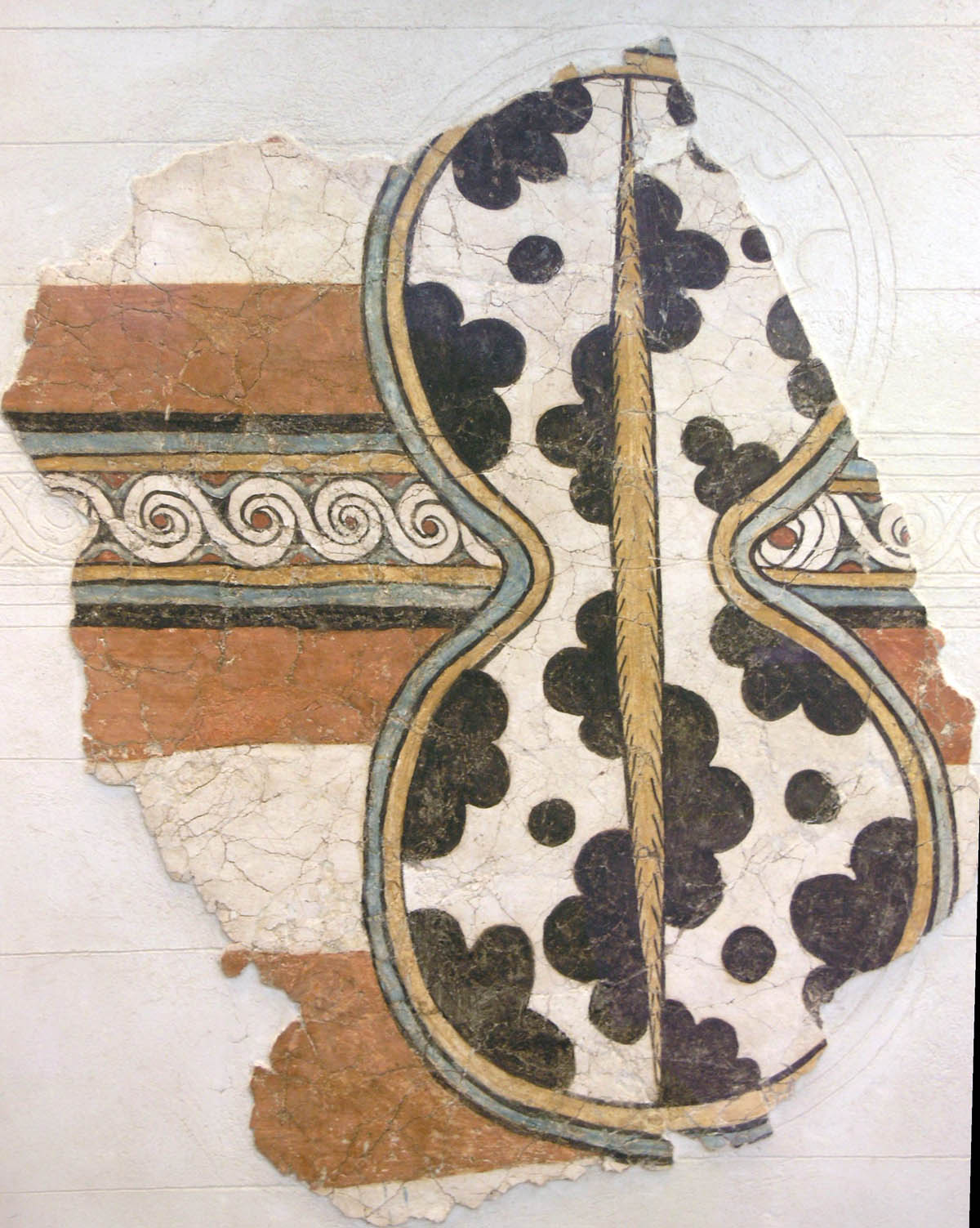 Fresques murales dépeignant des boucliers en forme de huit, avec une sangle de suspension au milieu. Le motif sur la surface du bouclier montre qu'il représente un modèle réel, fait de peau de vache. Ce type de bouclier, arme défensive, devient ici le symbole de la déesse de la guerre. Bien que le motif soit commun — on le trouve en orfèvrerie et en joaillerie à l'époque — il reste rare dans la peinture monumentale mycénienne. Musée archéologique national, Athènes, n°11671 et 11672.